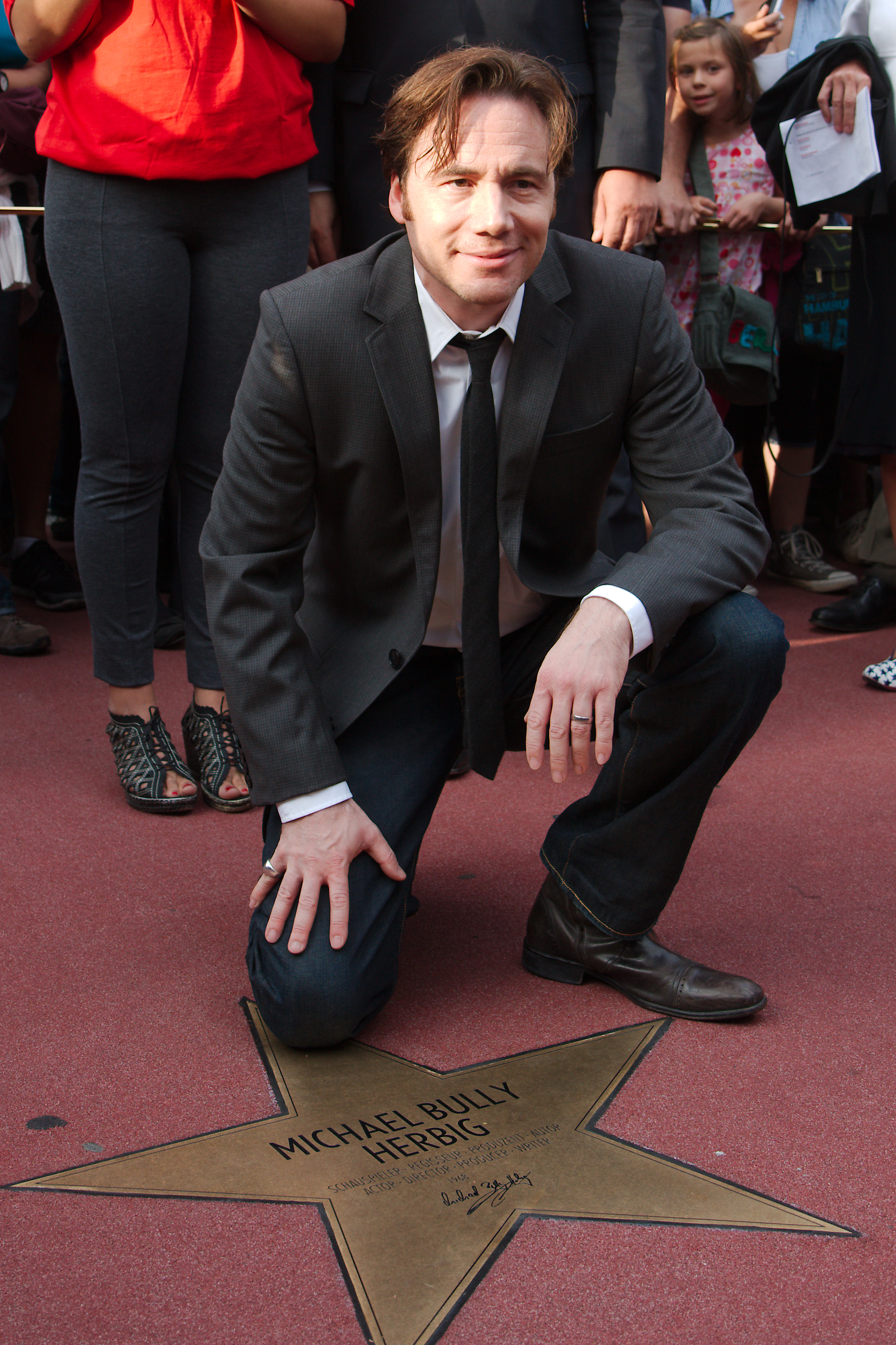 Die Hand ist vom Bürgermeister Wowereit